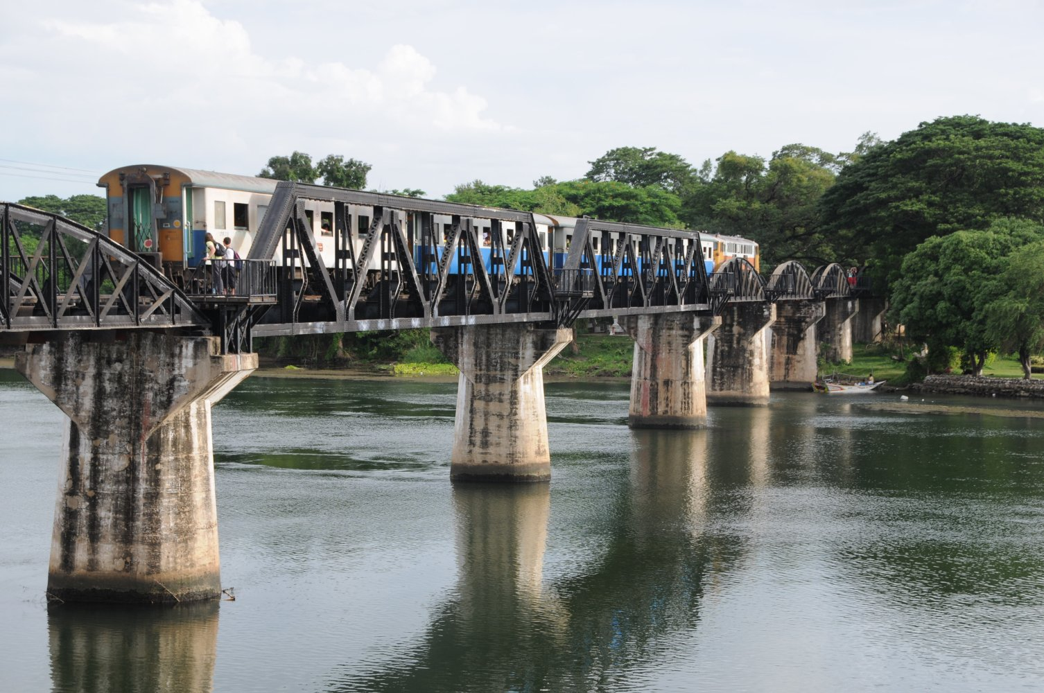 River Kwai, Kanchanaburi, Thailand